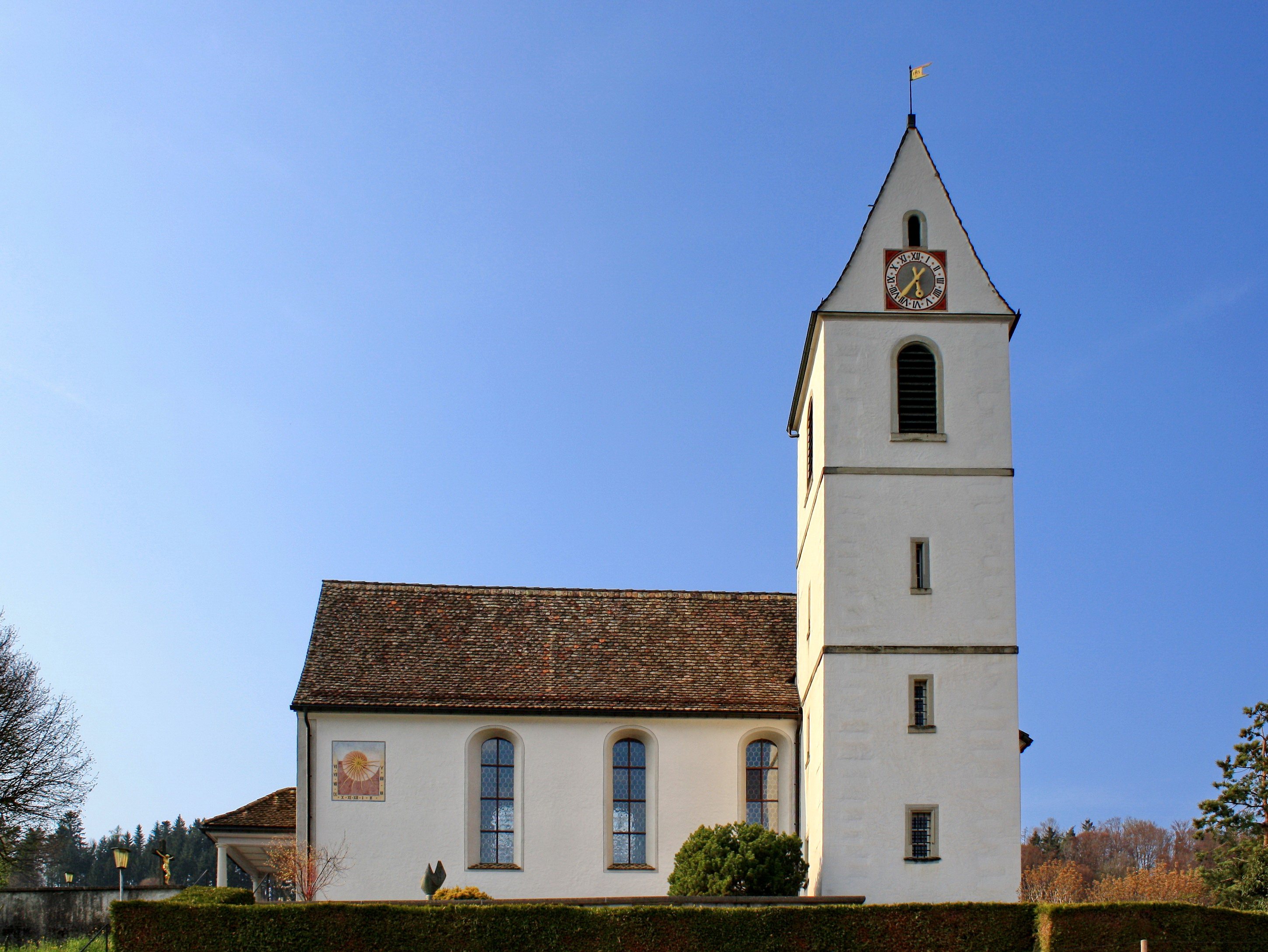 Pfarrkirche St. Pankratius in Bollingen on Obersee (upper Lake Zürich) shore